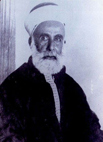 صورة شخصية للشريف الحسين بن علي